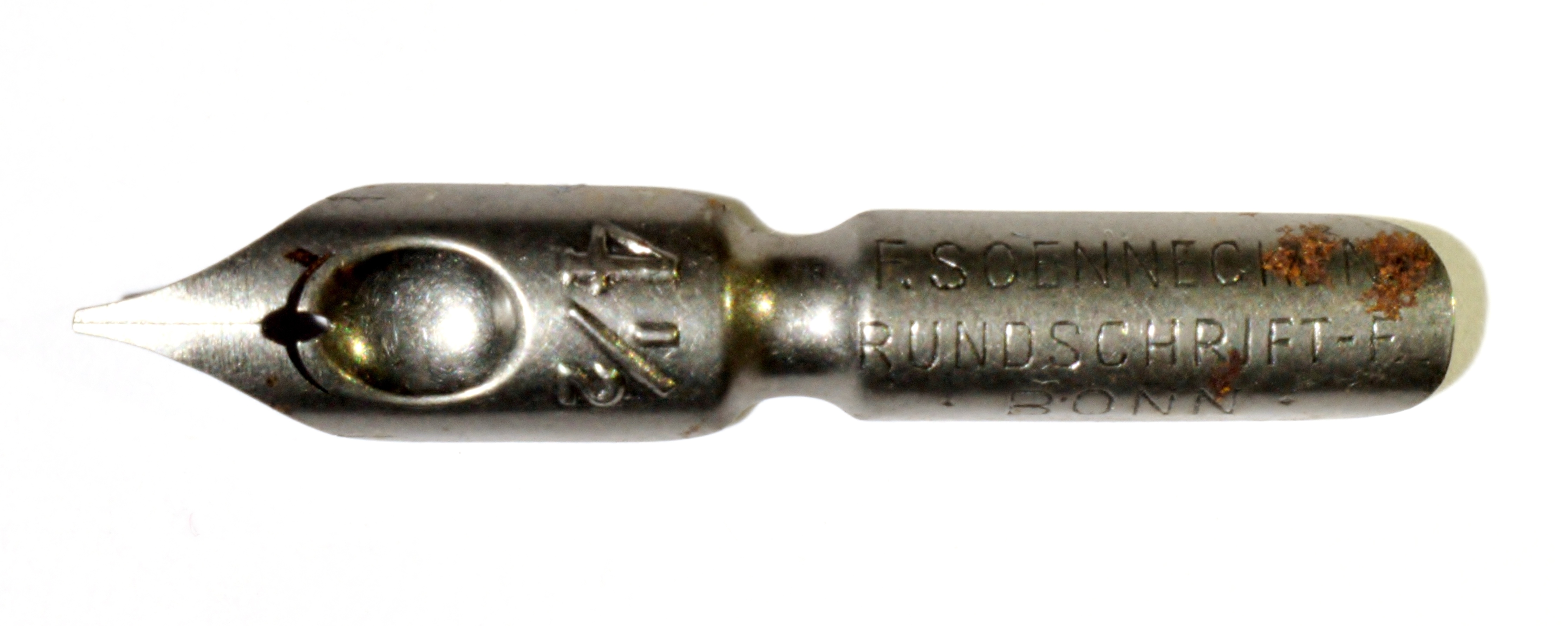 F. Soennecken — RUNDSCHRIFT-F – 4½